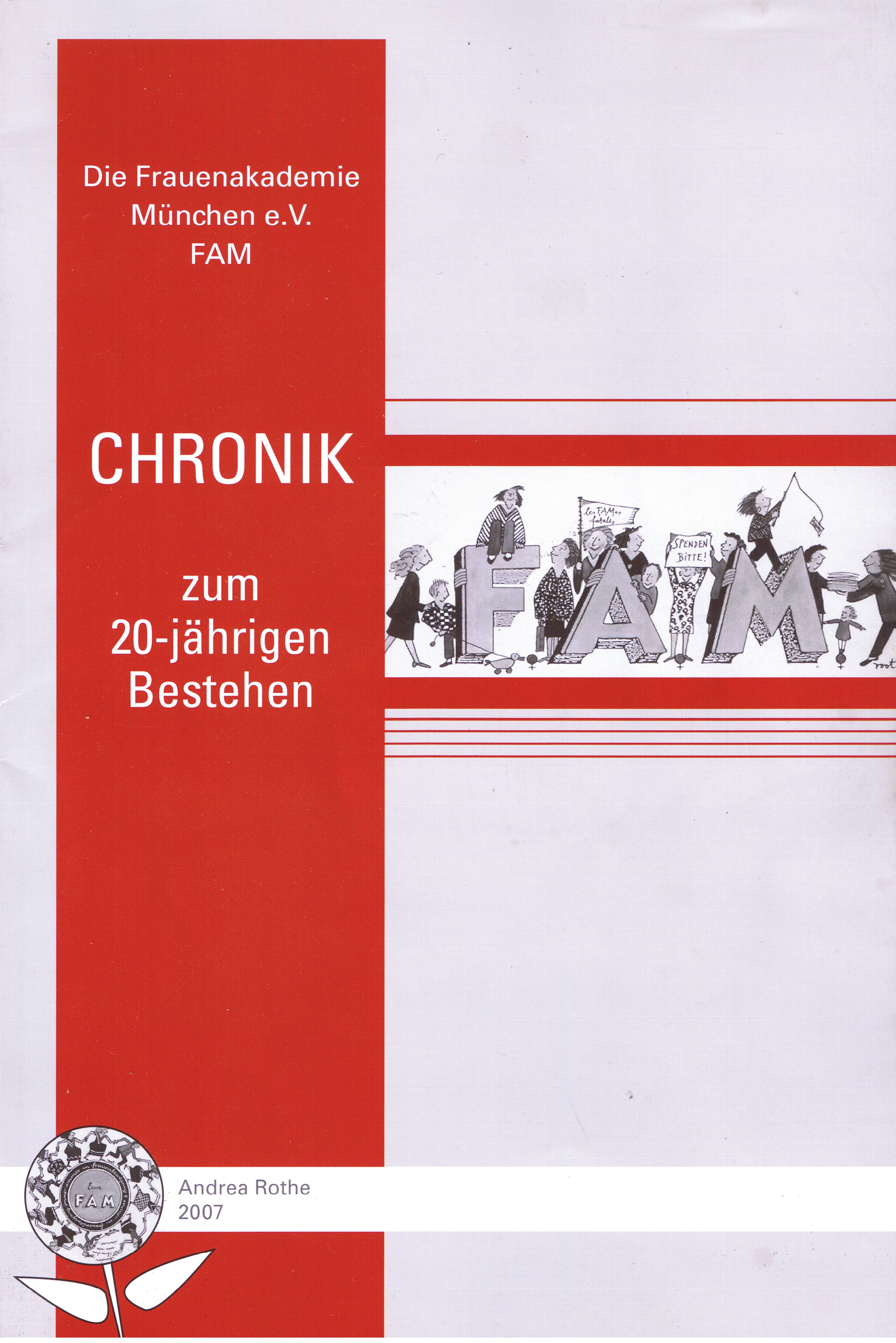 Titel der Jubiläumsschrift zum 20, Jubiläum der Frauenakademie München e.V. 2004: Rothe, Andrea: Die Frauenakademie München e.V. FAM. Chronik zum 20-jährigen Bestehen. Illustrationen: Root Leeb. Herausgegeben von der Frauenakademie München e.V. München 2007. ISBN 978 3-937120-06-8 Invalid ISBN